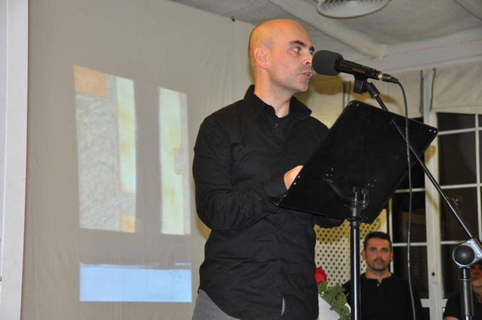 Alibe en acto literario